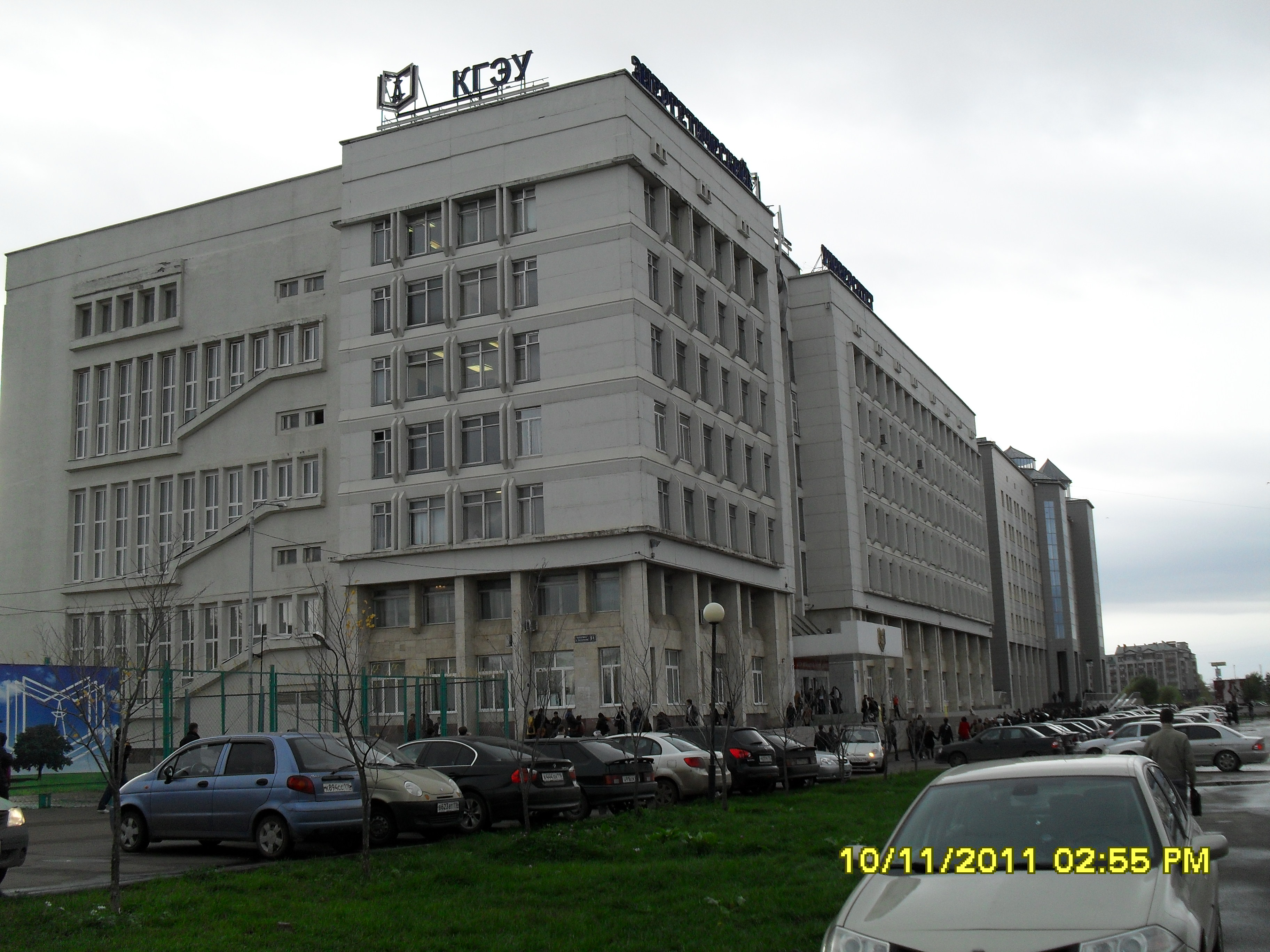 Здание КГЭУ на улице Декабристов